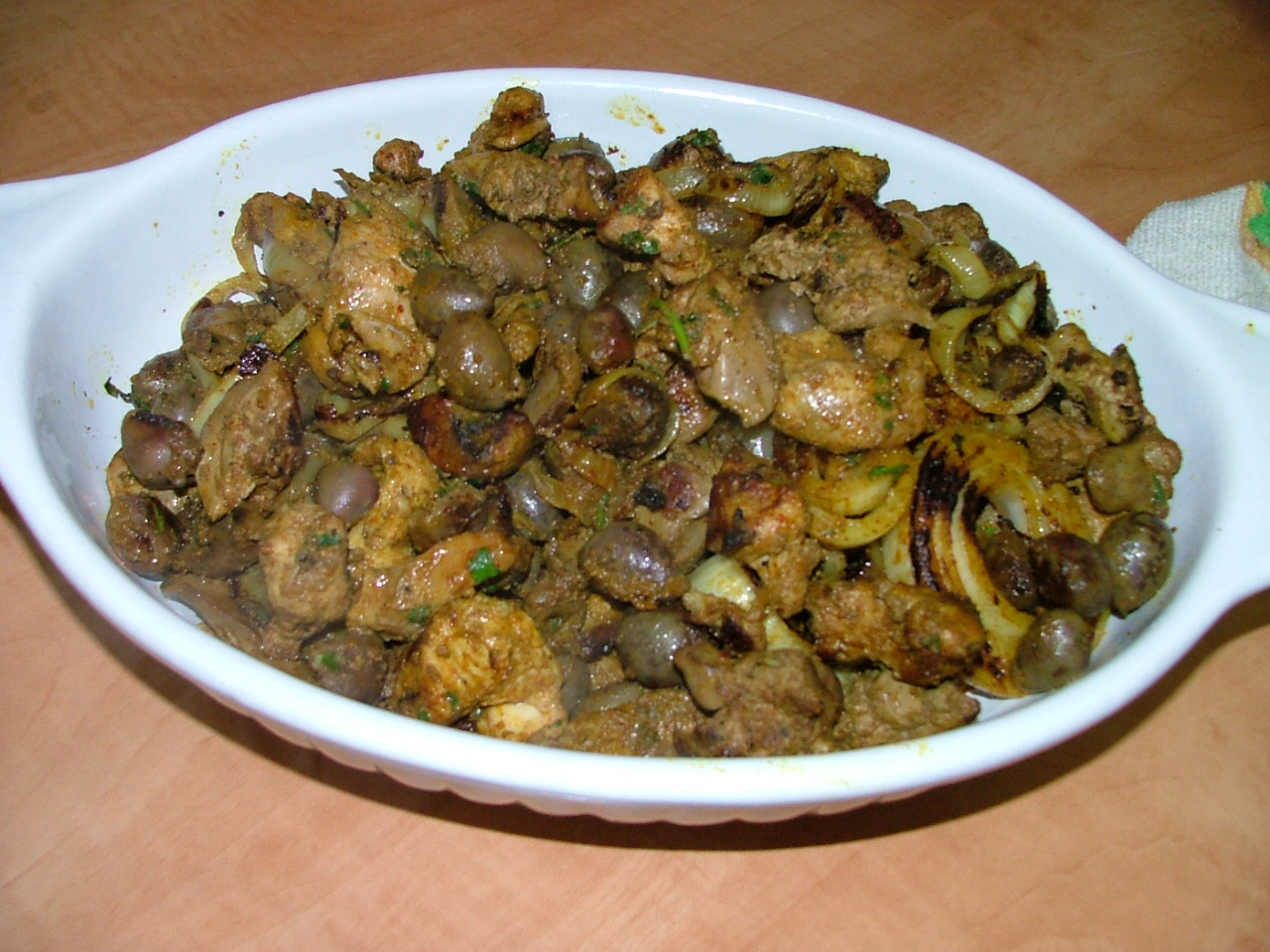 מעורב ירושלמי